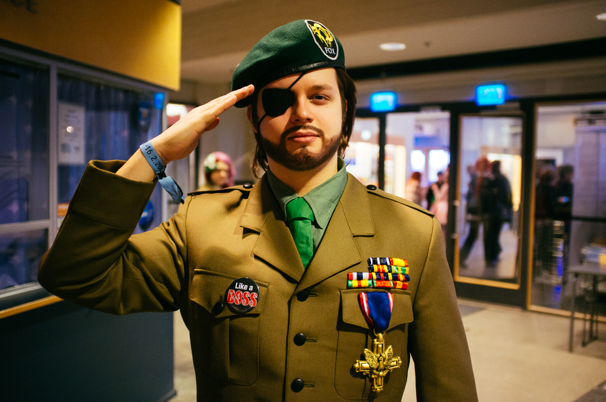 Desucon Frostbite 2014